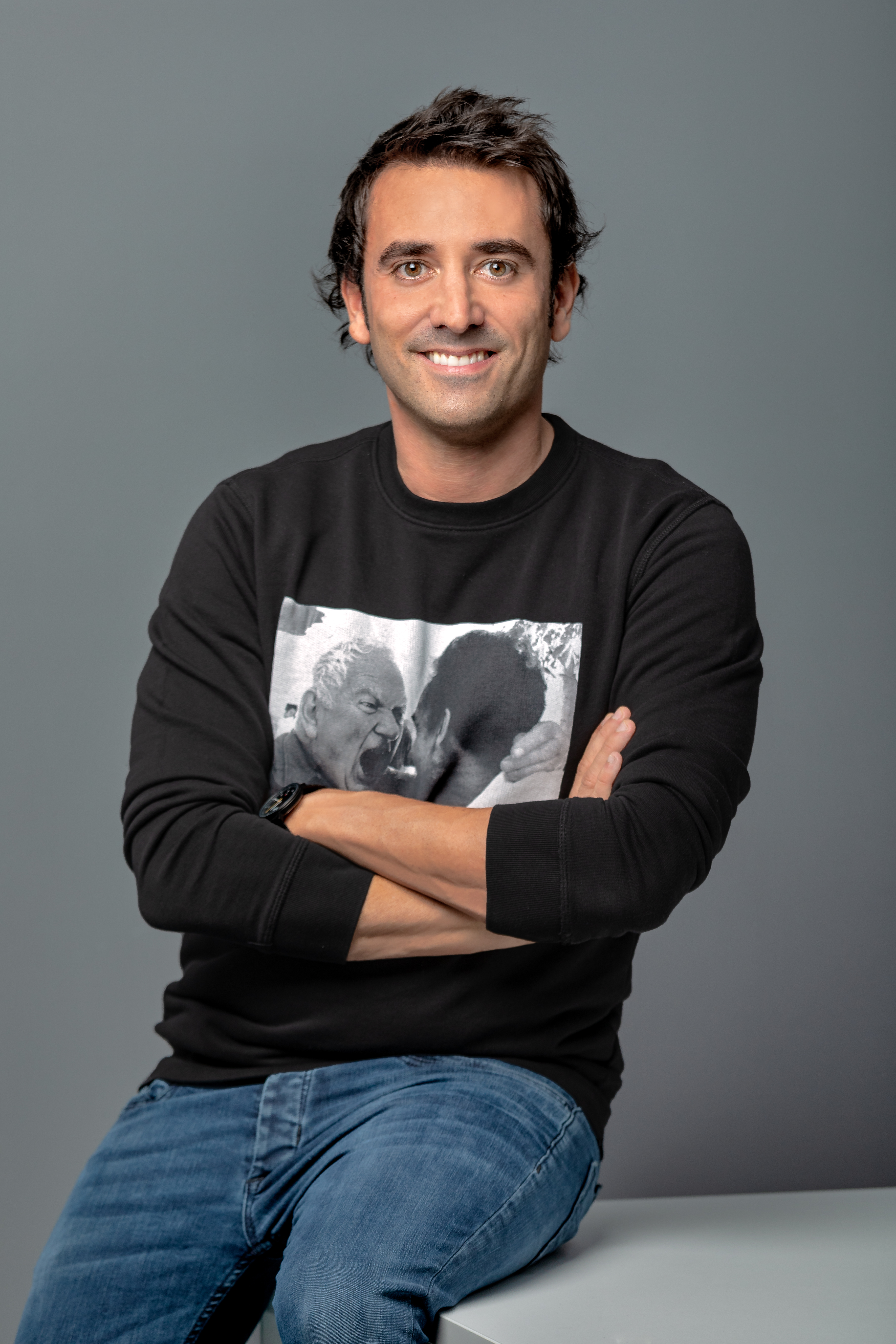 Artificial Intelligence